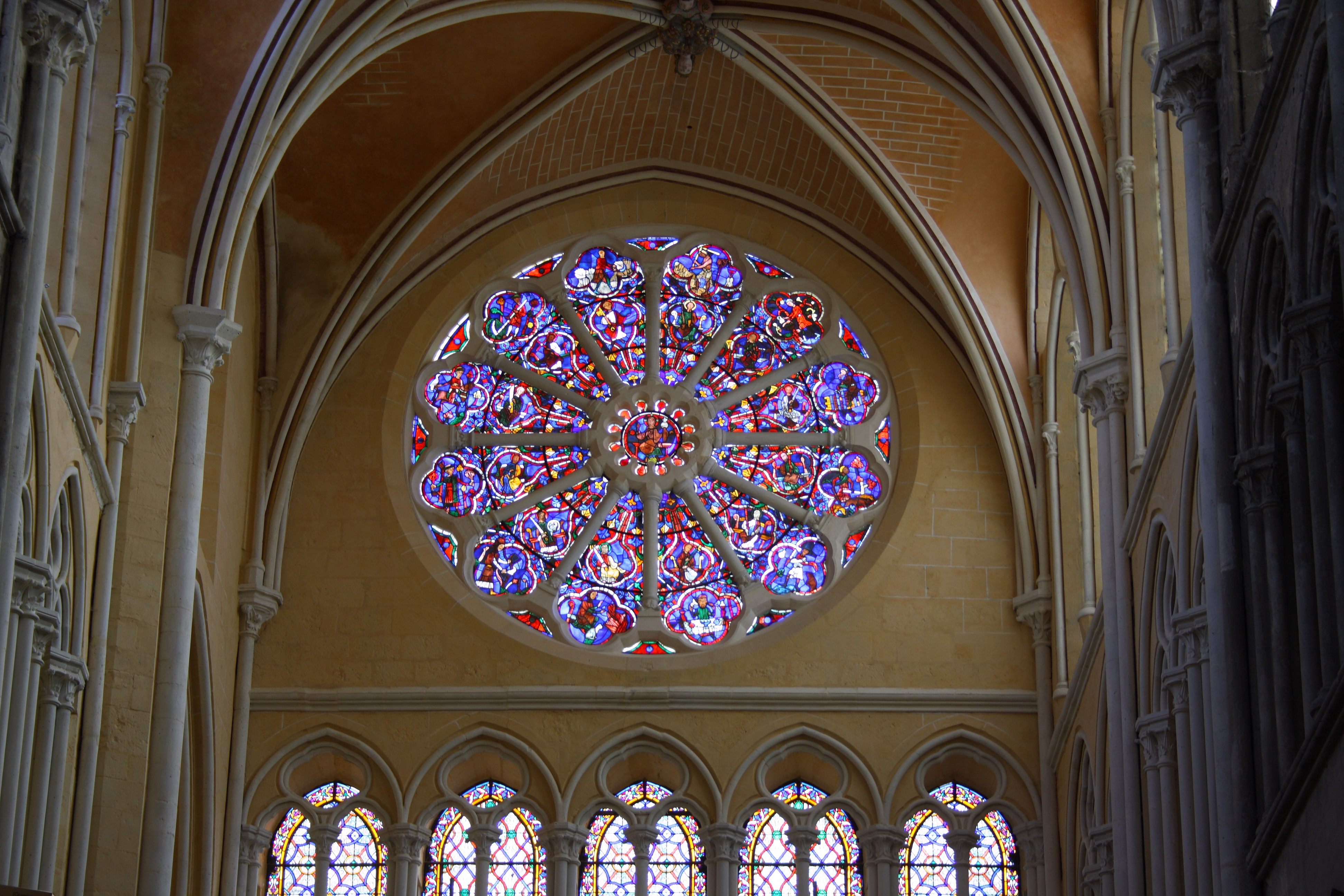 Katholische Pfarrkirche Saint-Étienne in Brie-Comte-Robert im Département Seine-et-Marne in der Region Île-de-France (Frankreich), Rosette, Darstellung: Christus und die zwölf Apostel, aus dem 13. Jahrhundert